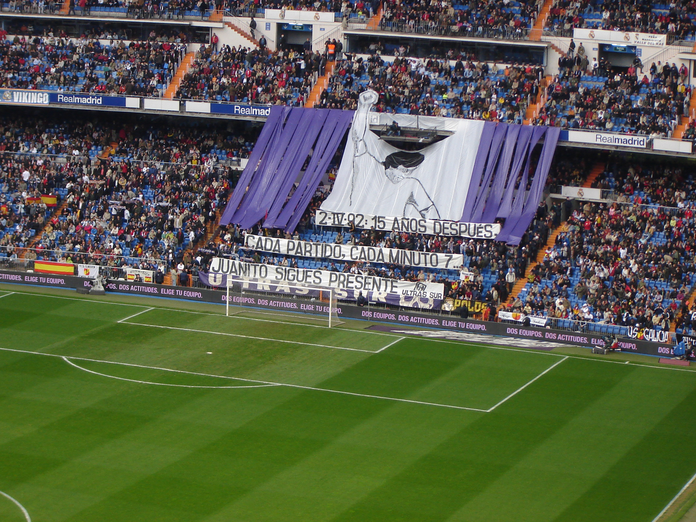 Ultras Sur commemorate Juanito at Santiago Bernabéu Stadium